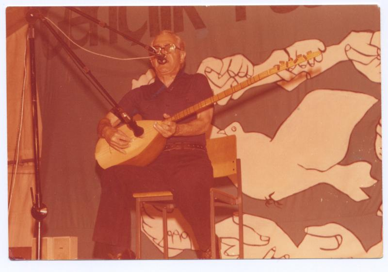 Almanya 1.Gençlik Festivali'nde Oğuz Gemalmaz'ın çektiği resim.